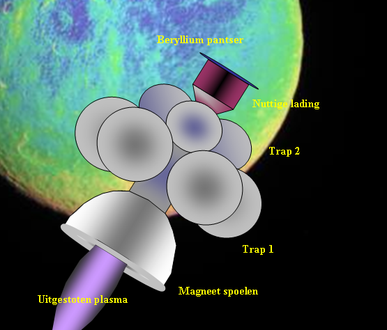 principeschets Daedalus ruimteschip ontwerp. Eigen werk. PD.